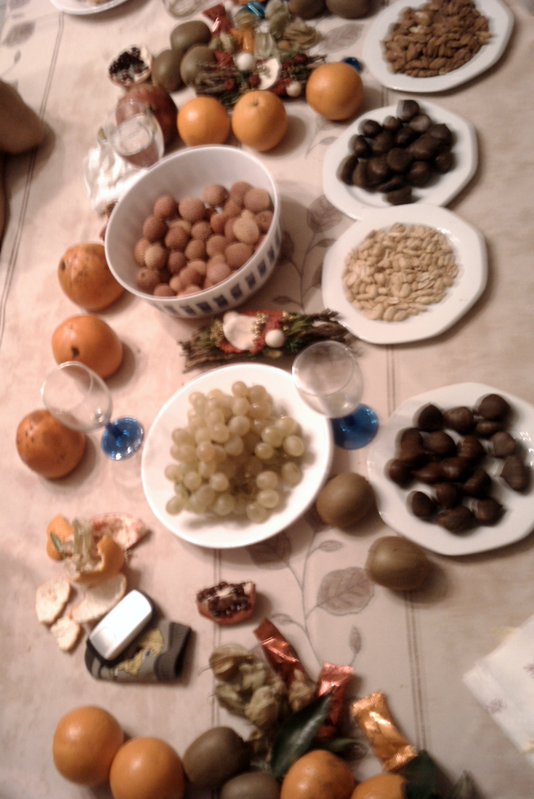 13 desserts de Noël en Provence